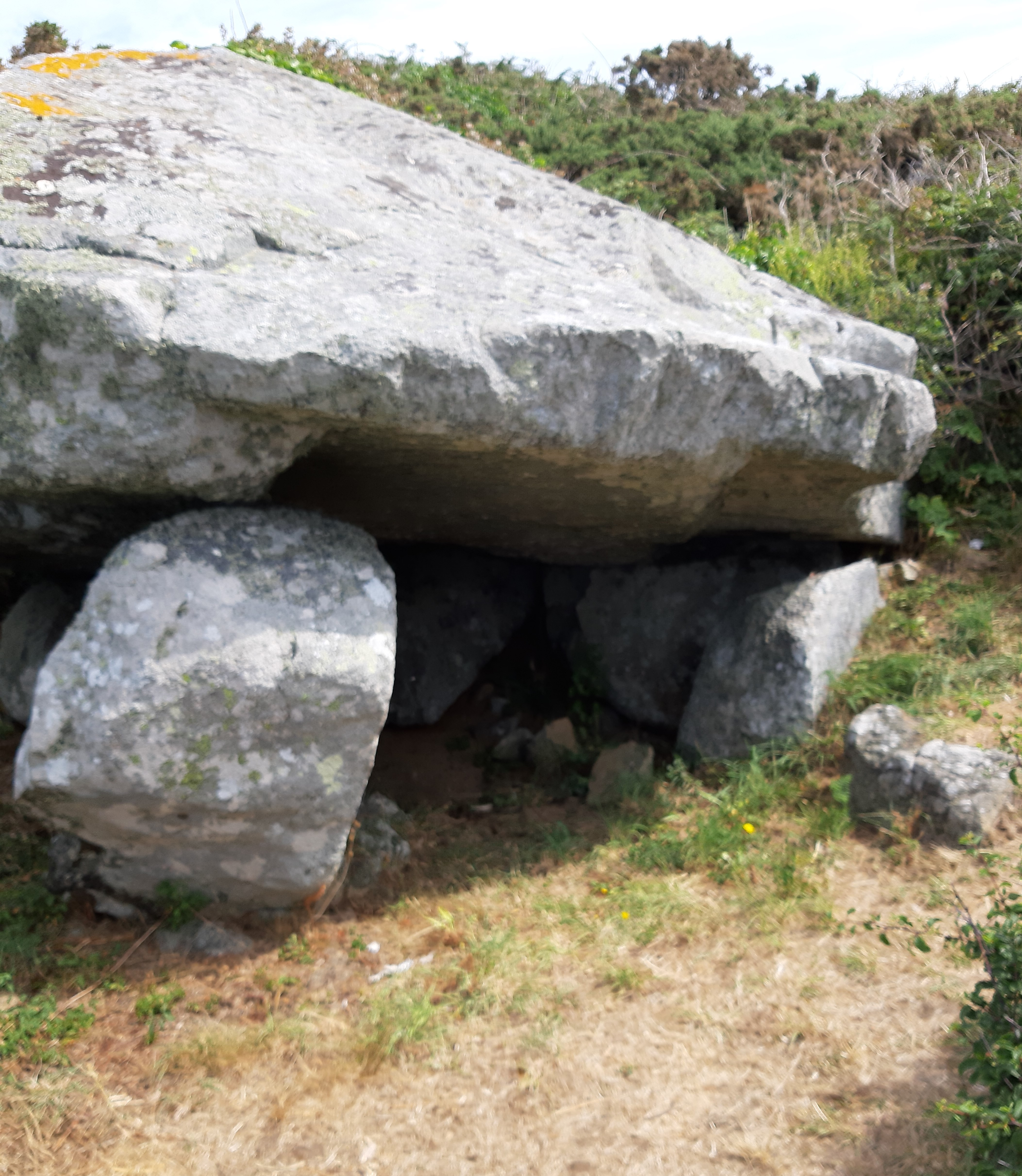 Die Dolmen aud Little Sark. Bild von vorne.